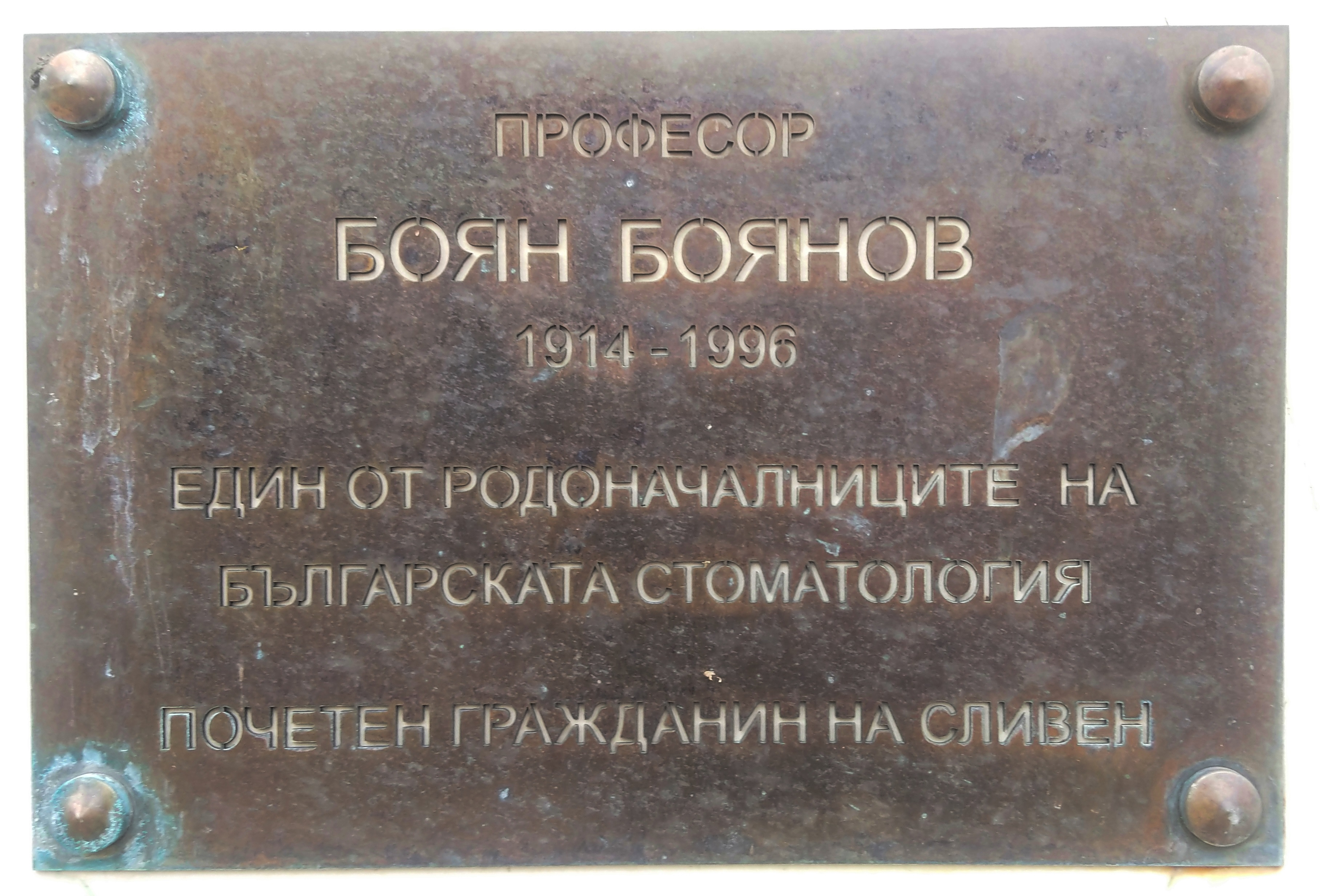 Паметна плоча на един от родоначалниците на българската стоматология, професор Боян Боянов (1914-1996), почетен гражданин на Сливен